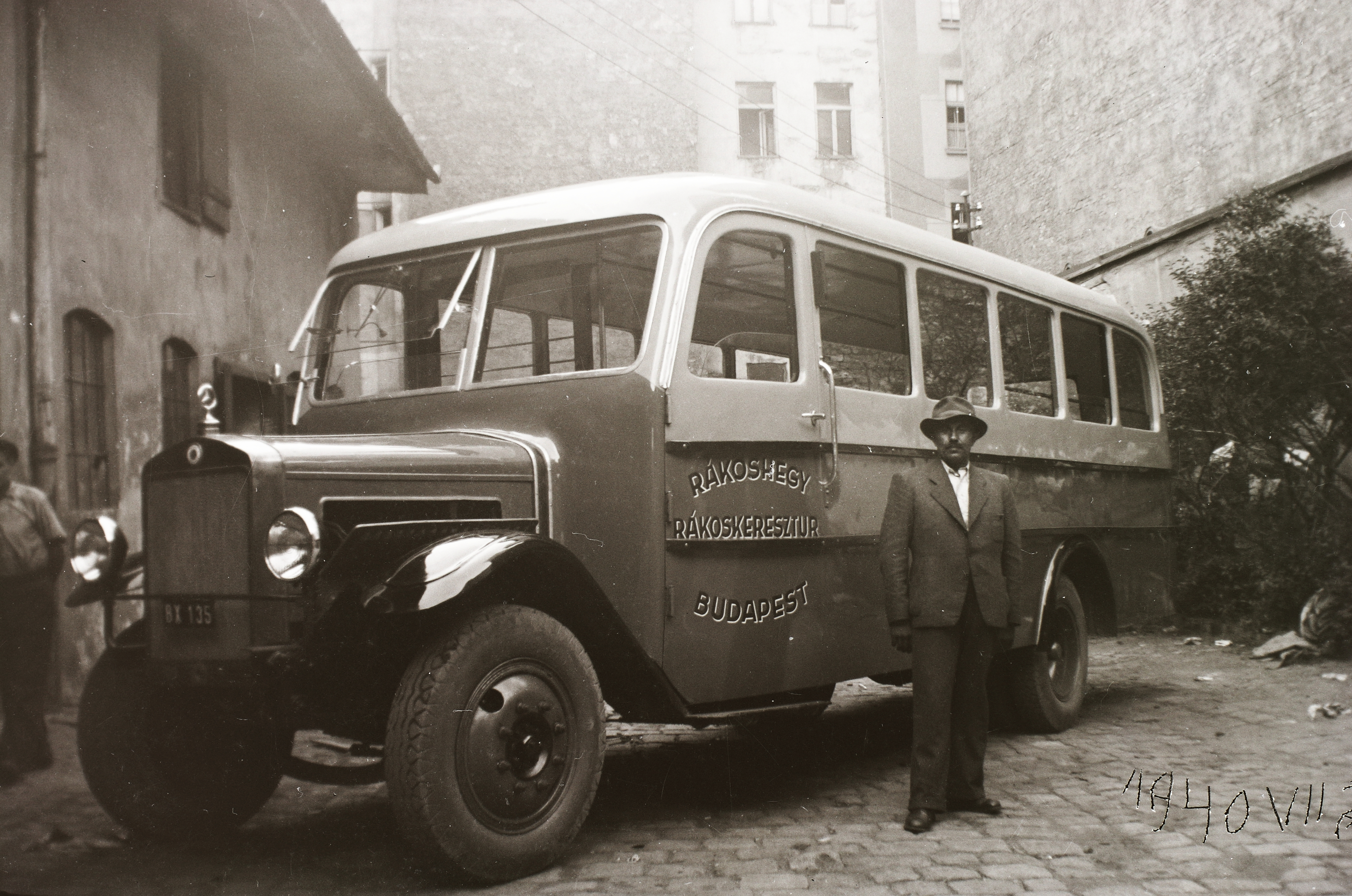 Rákoshegyi Autóbuszközlekedési Vállalat autóbusza, MÁVAG-Mercedes-Benz N típus. Licenc alapján a MÁVAG gyártotta. Location: Hungary, Budapest Tags: MÁVAG-brand, Mercedes-brand, license, Hungarian brand, bus Title: Rákoshegyi Autóbuszközlekedési Vállalat autóbusza, MÁVAG-Mercedes-Benz N típus. Licenc alapján a MÁVAG gyártotta.